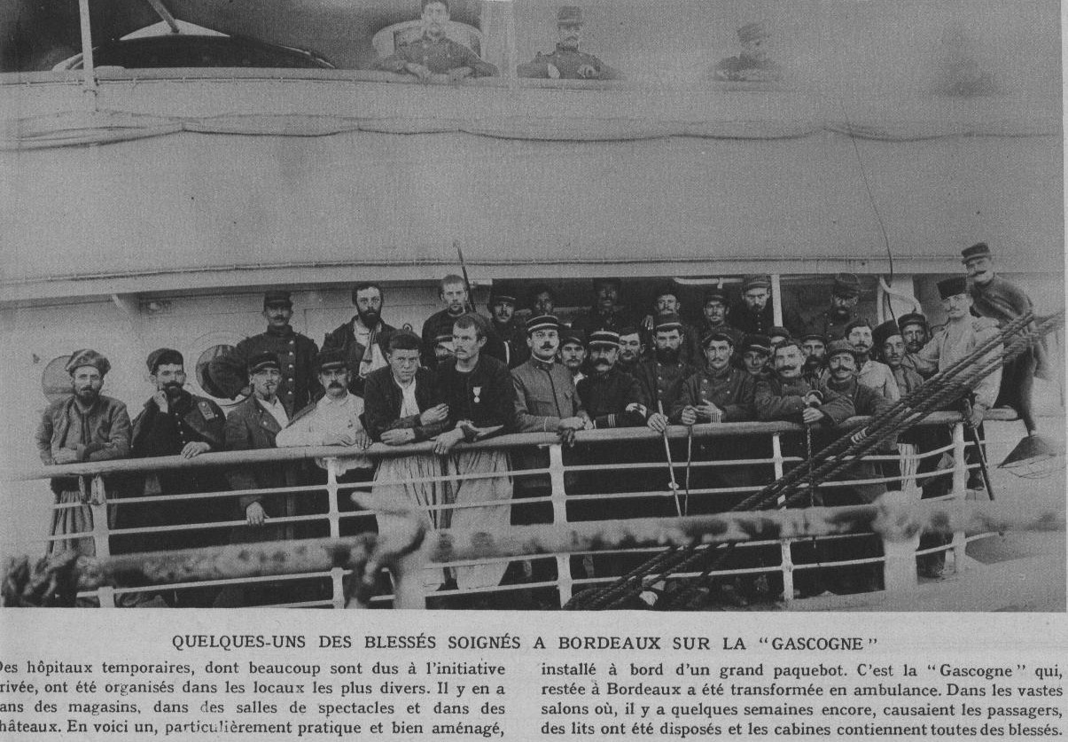 Des blessés soigné sur le baquebot La Gascogne, en rade de bOrdeau, posent.